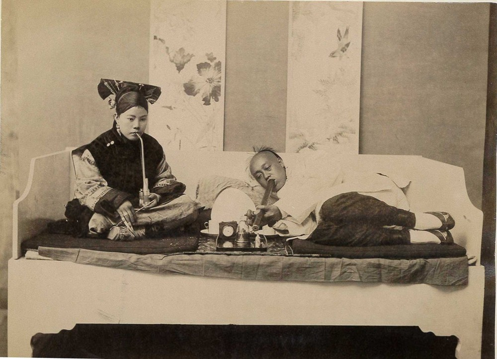 中国での阿片喫煙者